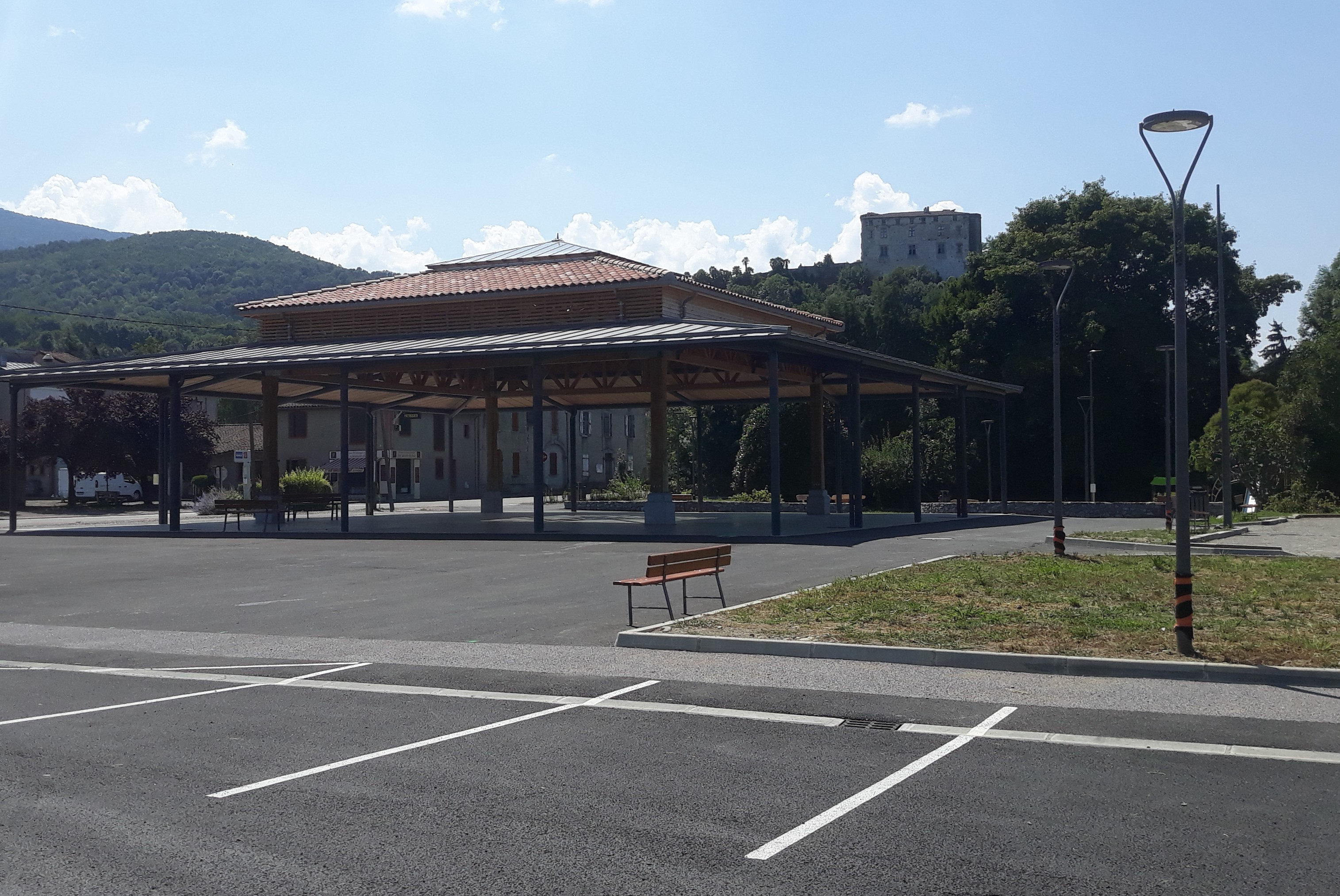 Halle de Prat-Bonrepaux (Ariège, France)